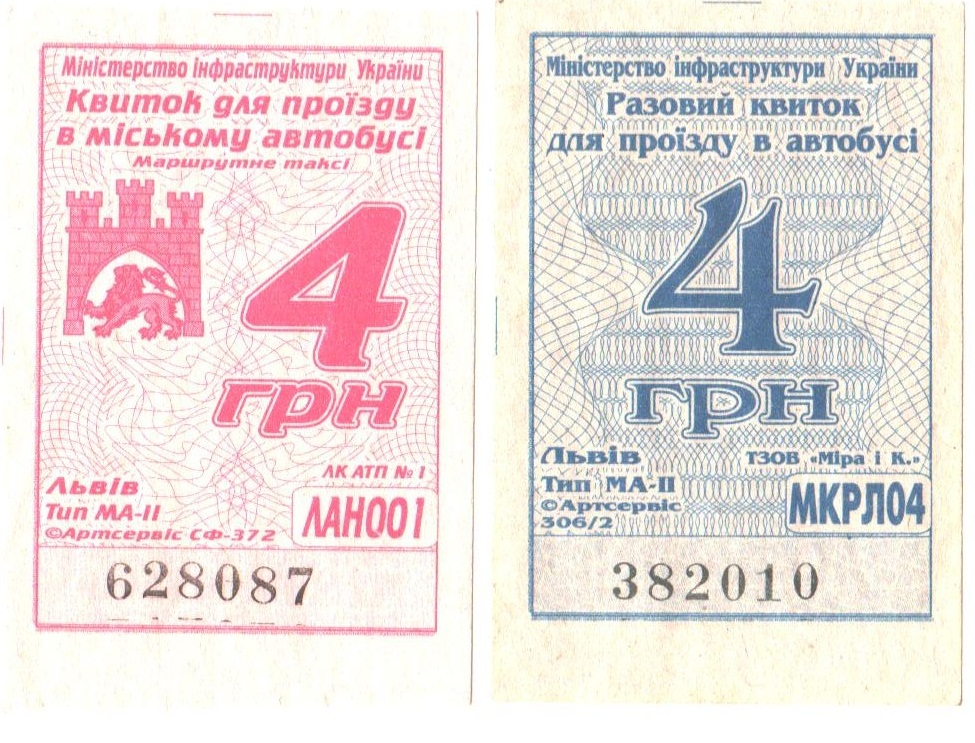 разовий квиток для проїзду в міському автобусі компаній "АТП №1" та ТзОВ "Міра і К"